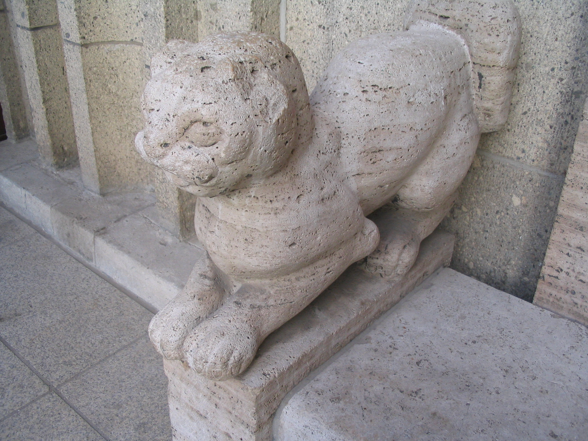 Carl-Moritz Schreiner, 2 Bänke (die rechte Bank) neben dem Osteingang des Museum Kunstpalast, Ehrenhof, Robert-Schumann-Saal.